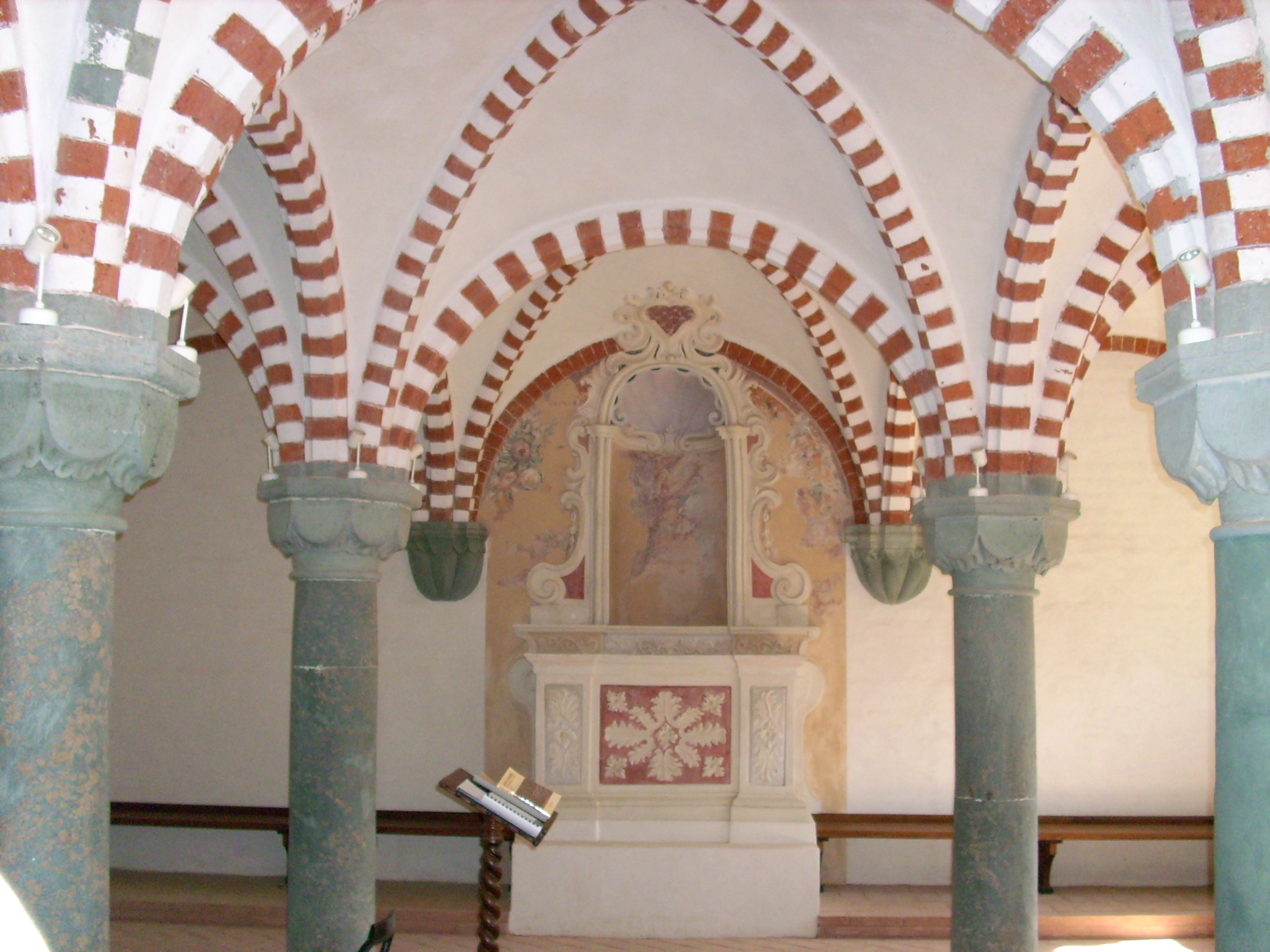 Interno del chiostro della Badia di Tiglieto, Liguria, Italia